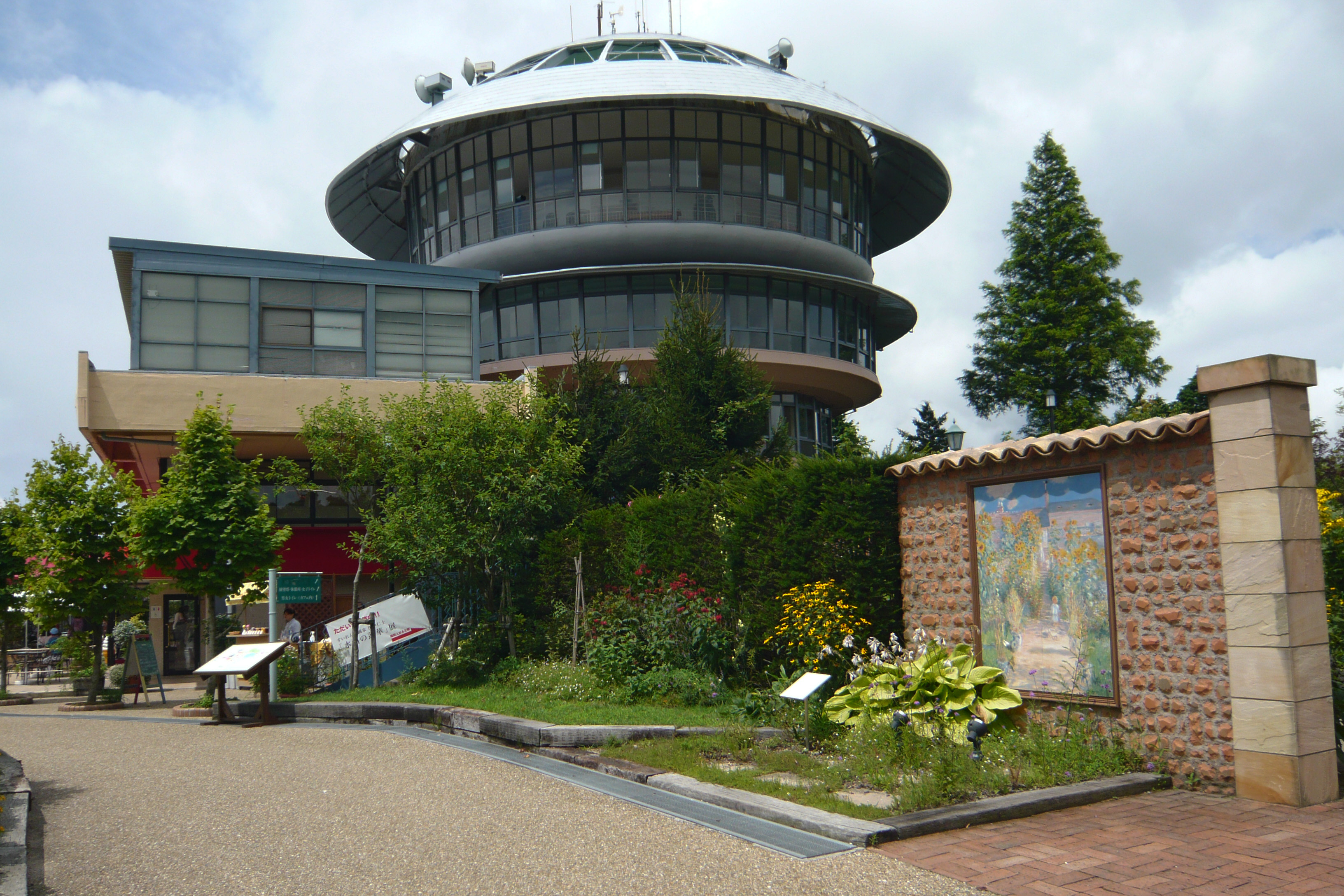 Garden Museum Hiei (ガーデンミュージアム比叡), Kyoto, Japan